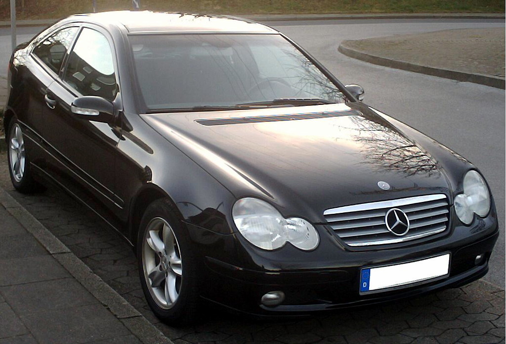 Mercedes C-Klasse Sportcoupé